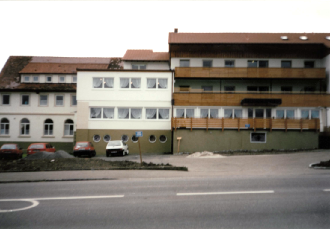 Neubau an Stelle der abgebrannten Gaststätte zur Linde